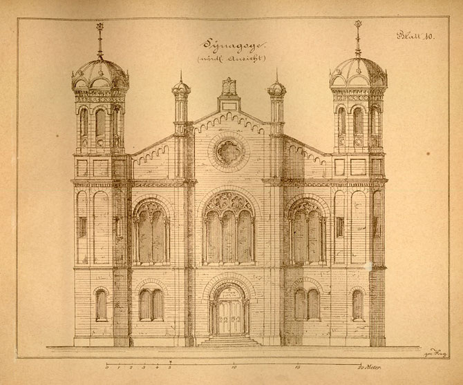 Bauzeichnung der Liberalen Synagoge in Darmstadt